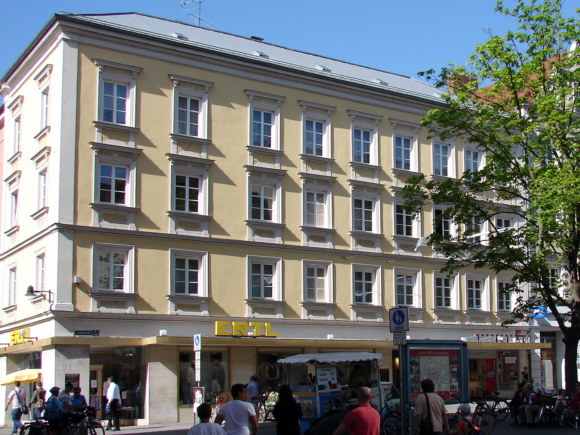 Viergeschossiges Eckhaus mit klassizisierend gegliederten Fassaden, durch Zusammenfassung und Aufstockung mehrerer Vorgängerbauten um 1880/88 entstanden.